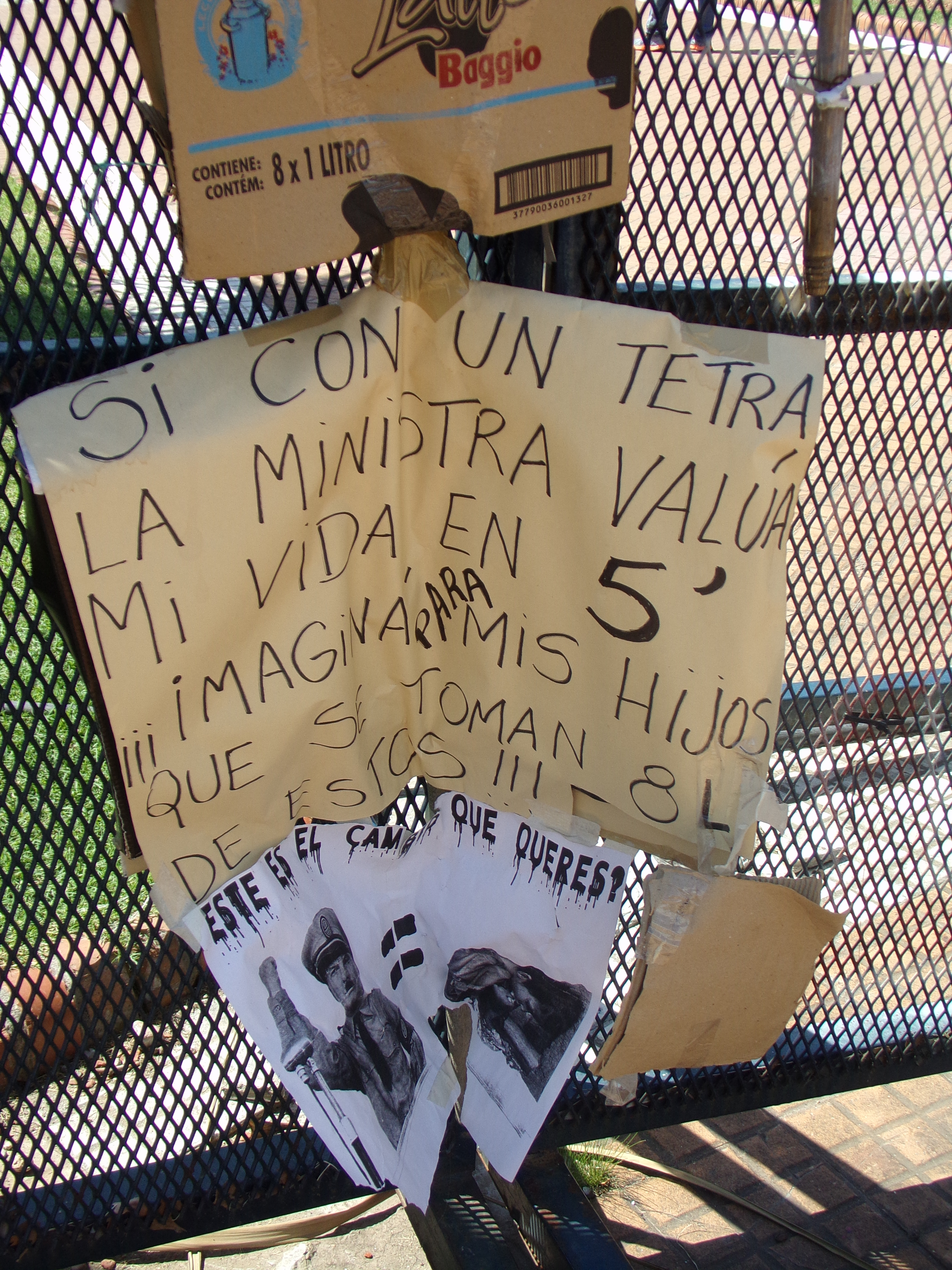 Patricia Bullrich y el protocolo anti-piquetes. Plaza de Mayo, Buenos Aires.